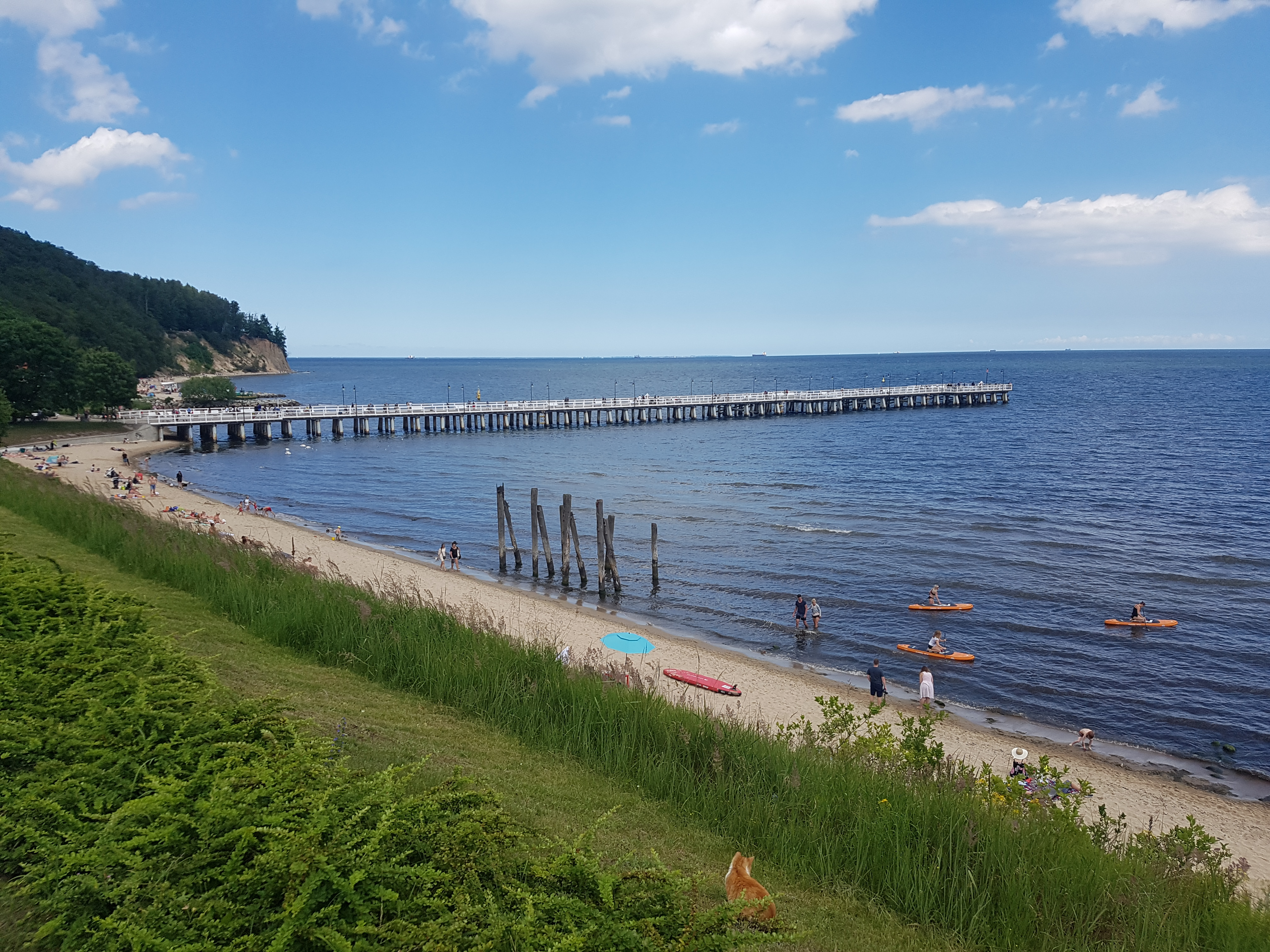 Molo w Gdyni Orłowie